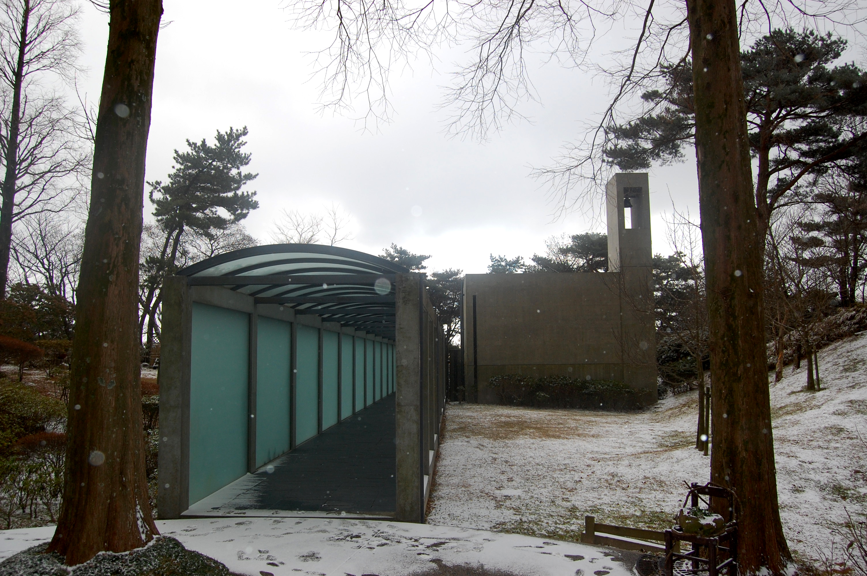 Rokko Mount Chapel